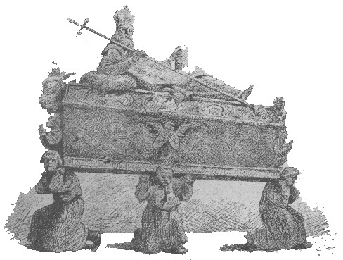 St.Adalbert's tumb in Gniezno